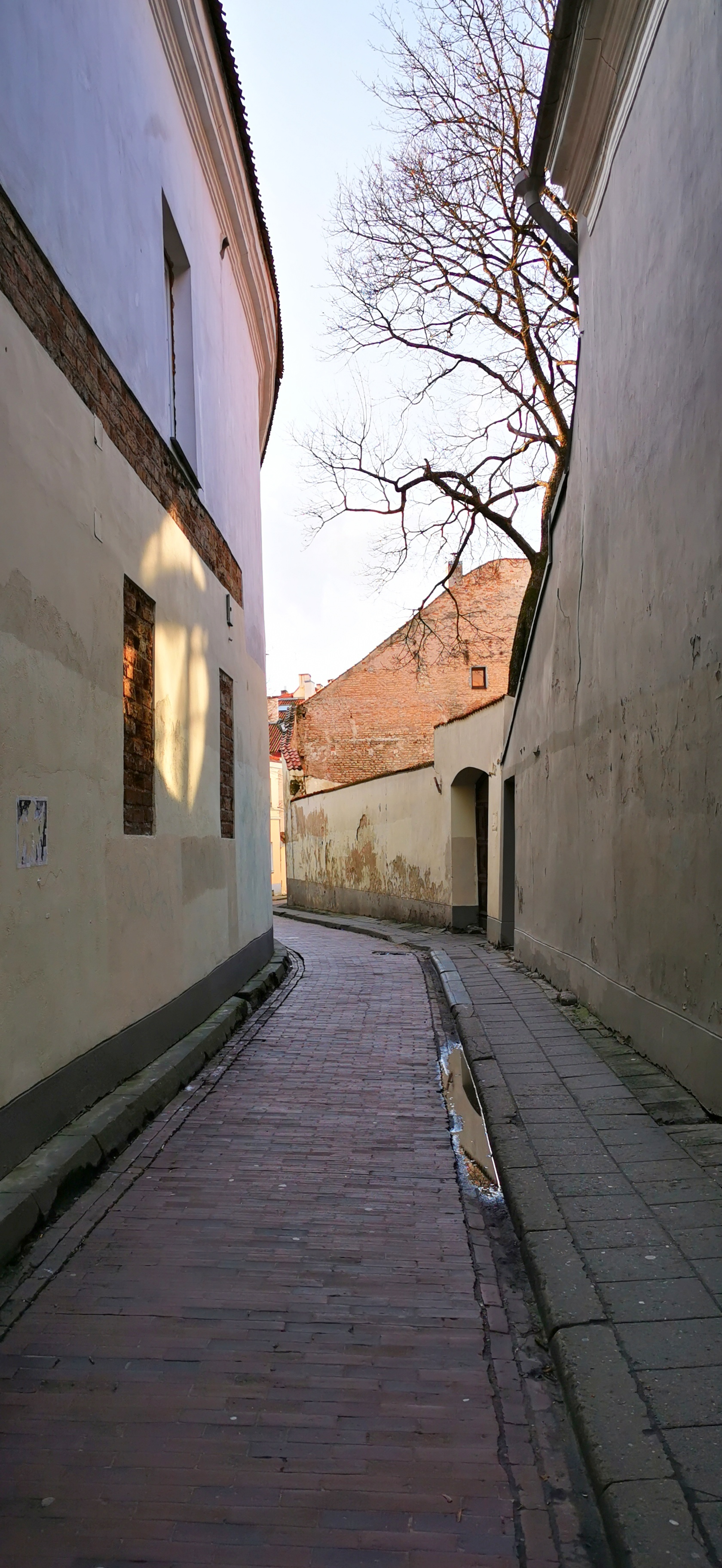 Skapo gatvė Vilniuje, matyti išilginės belangės sienos fragmentas